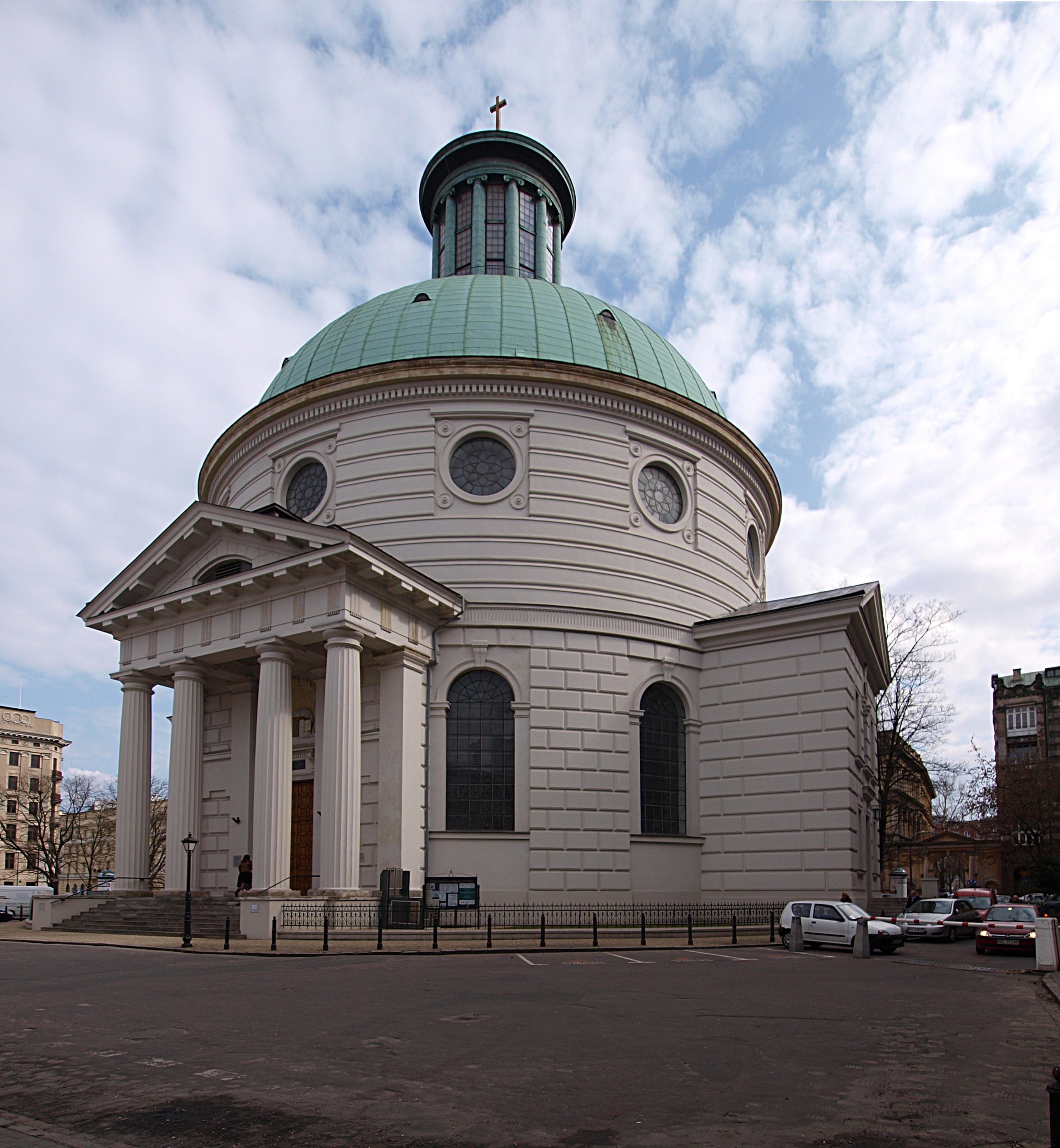 Kościół św. Trójcy w Warszawie.